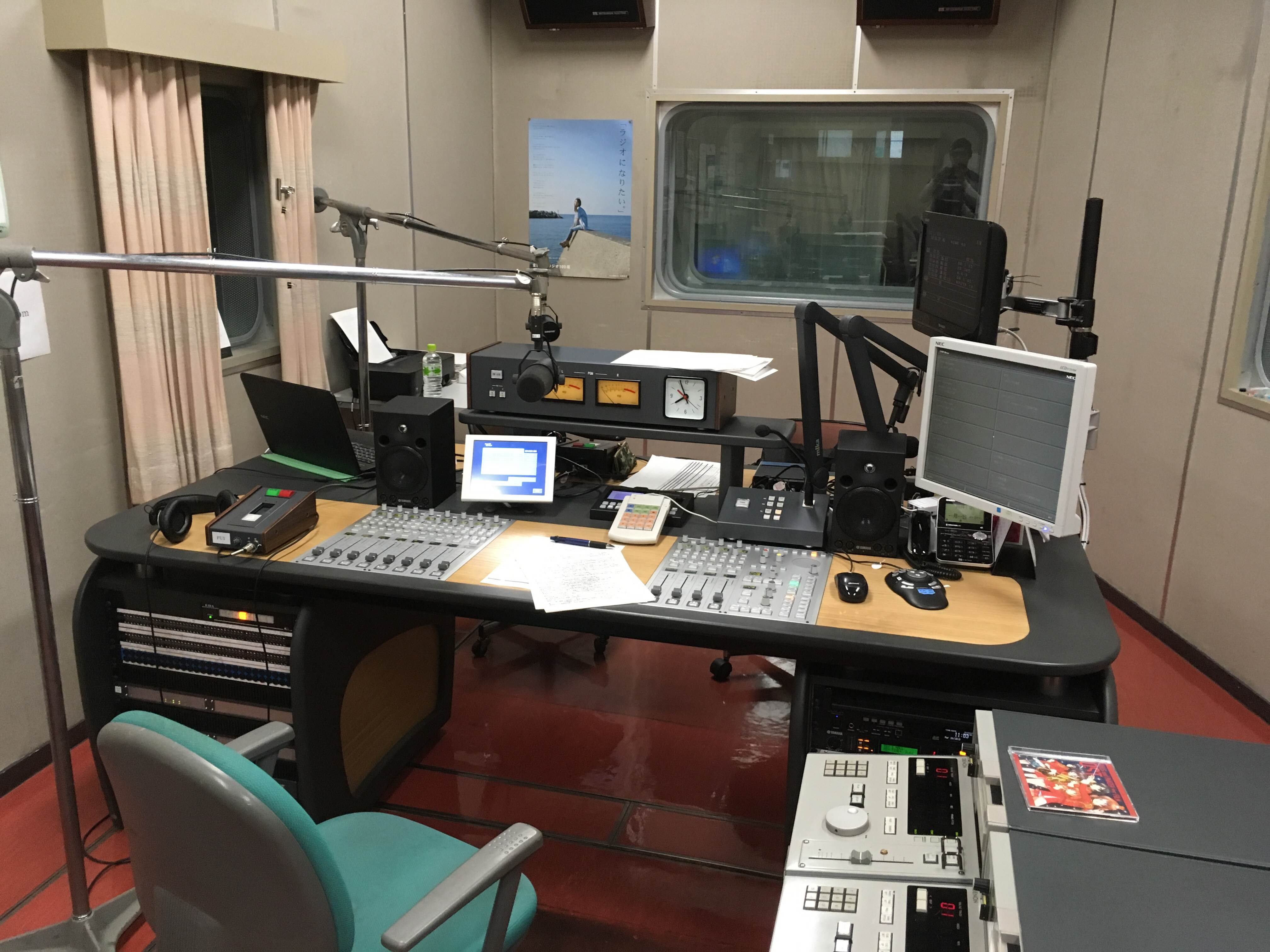 部屋（エフエム秋田 第二スタジオ）2016年9月19日撮影